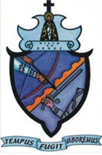 Escudo de Jerez, Zacatecas